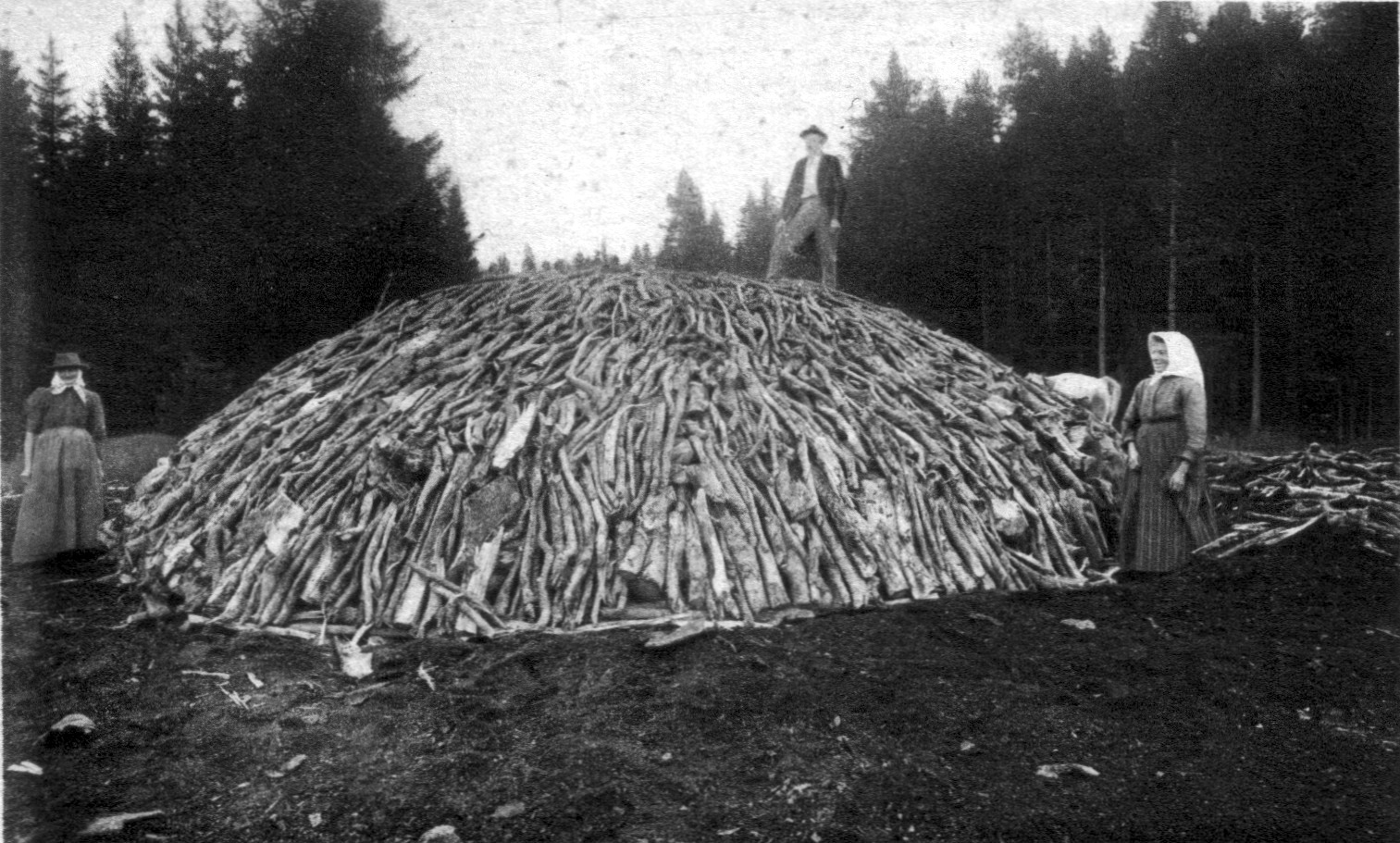 Fertiggestellter Meiler. 30-40m Umfang. 70-80 Meter Raummeter Stockholz